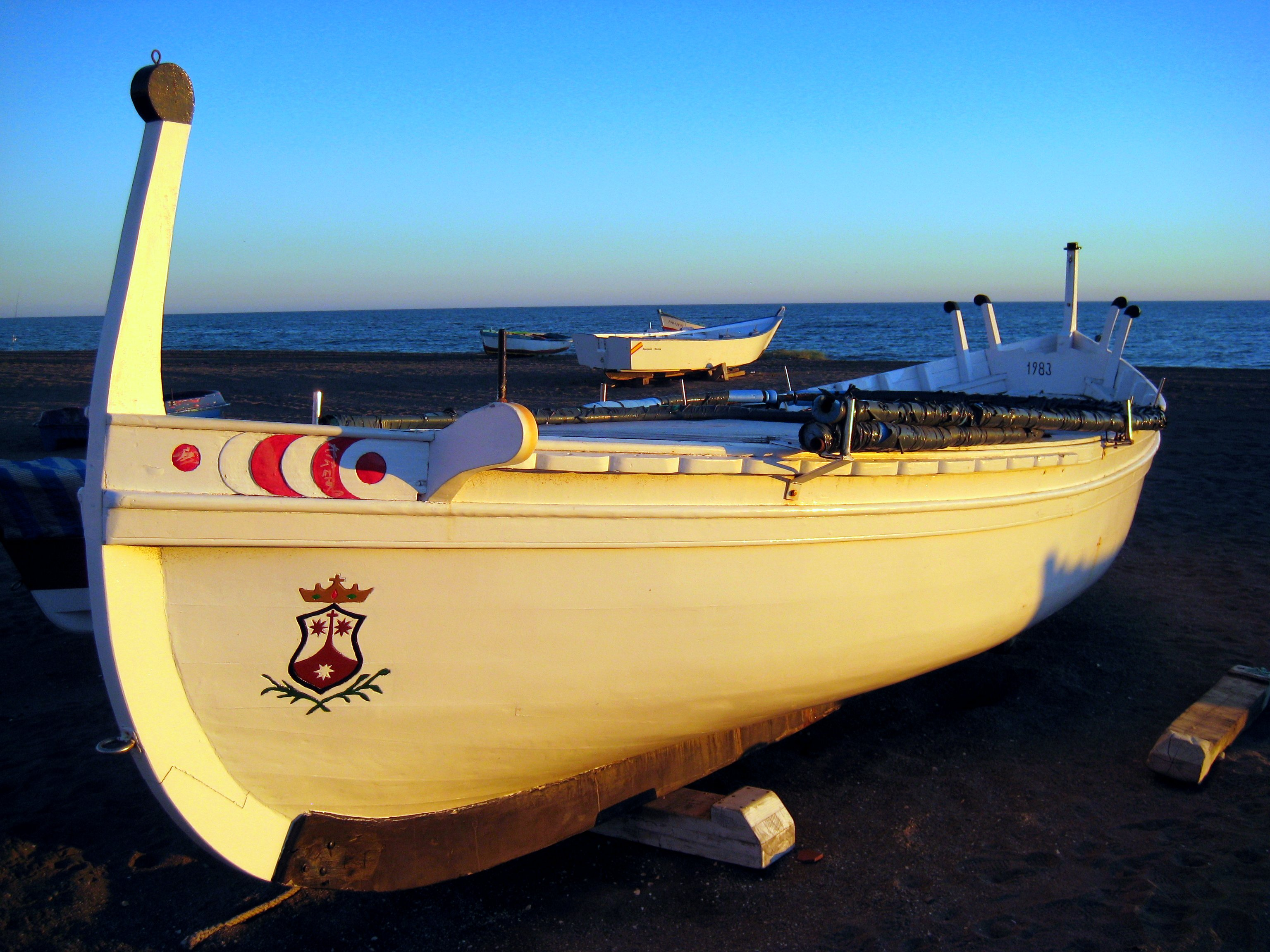 Jábega en Rincón de la Victoria, Málaga, España.